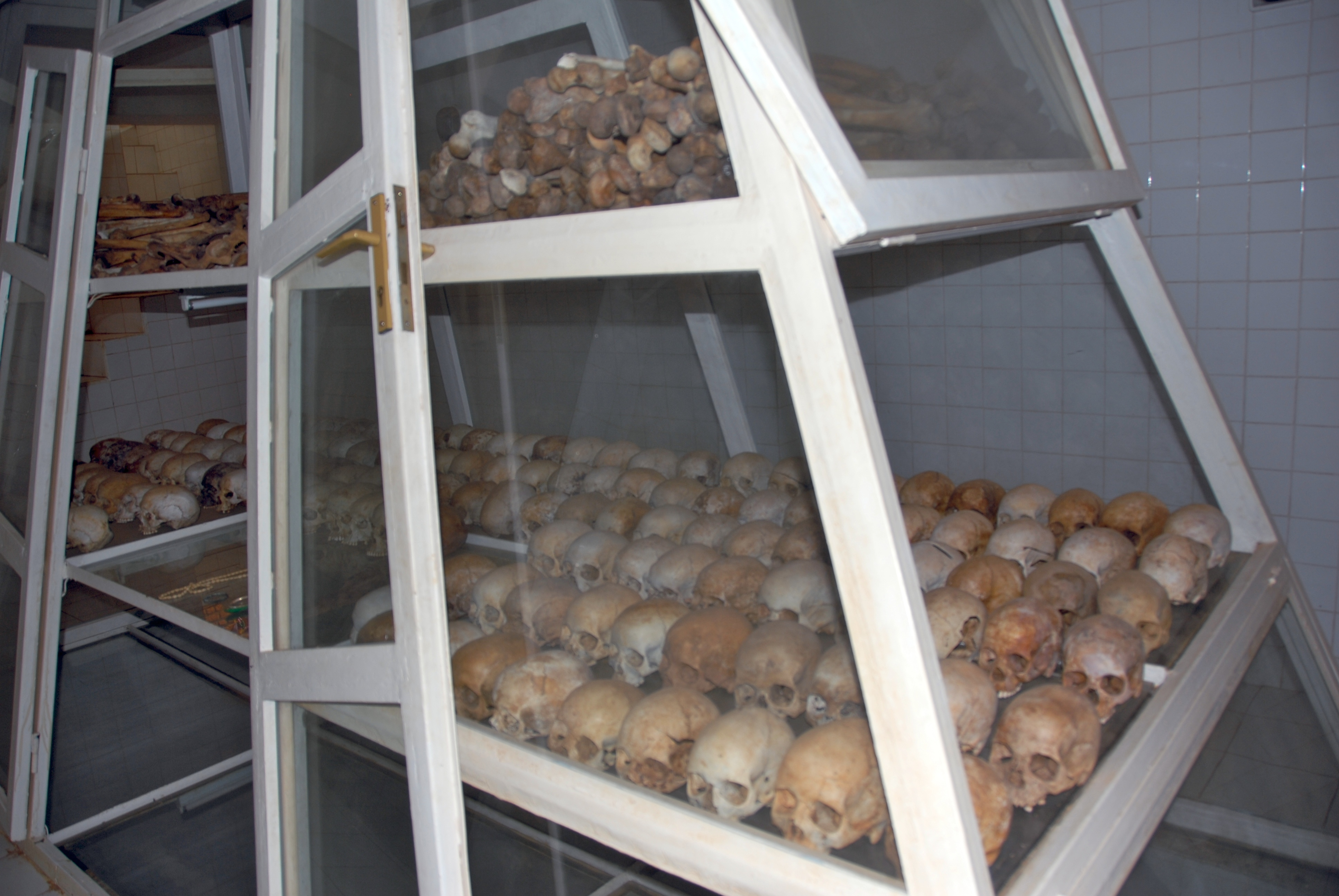 Nyamata Genocide Memorial Church